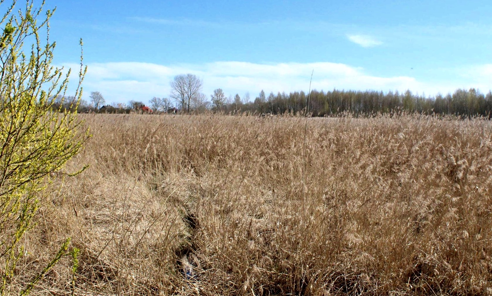 Krēmeri, dabas lieguma centrālā daļa.